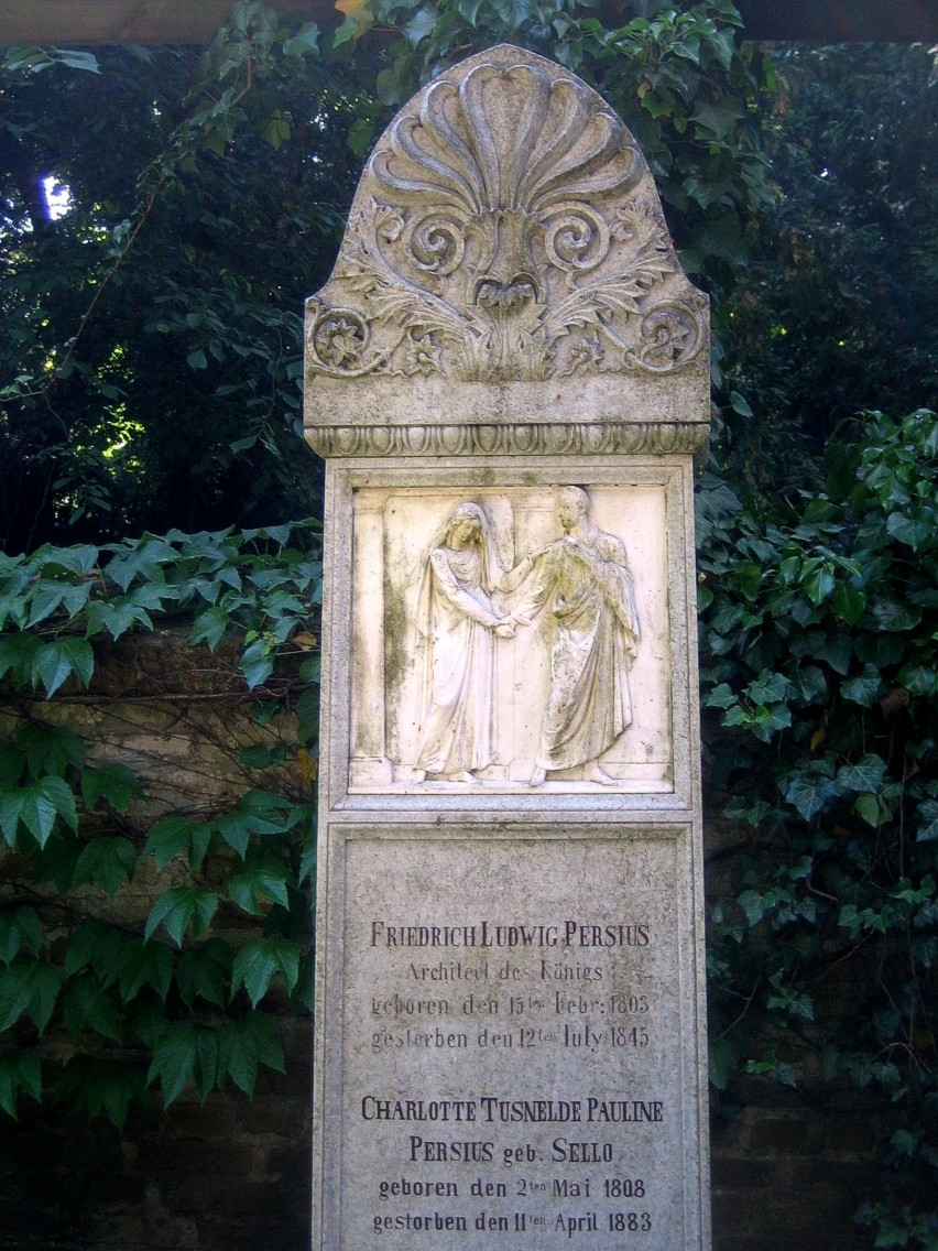 Grabstele des preußischen Architekten Friedrich Ludwig Persius auf dem Friedhof von Bornstedt bei Potsdam.